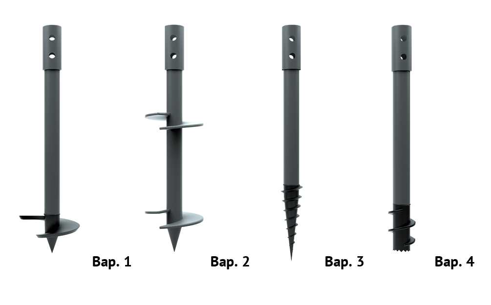 ГлавФундамент, винтовые сваи, виды винтовых свай